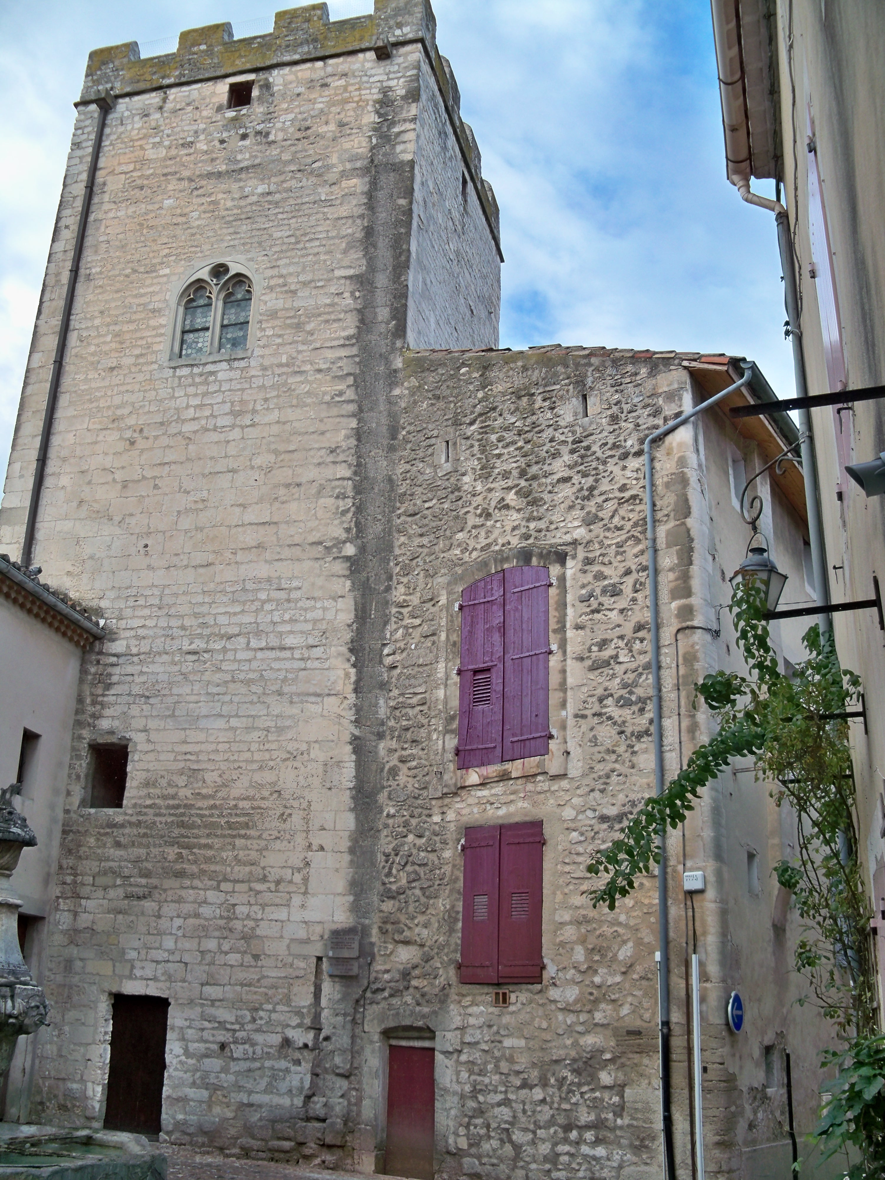 Tour Ferrande de Pernesles Fontaines, Vaucluse, France